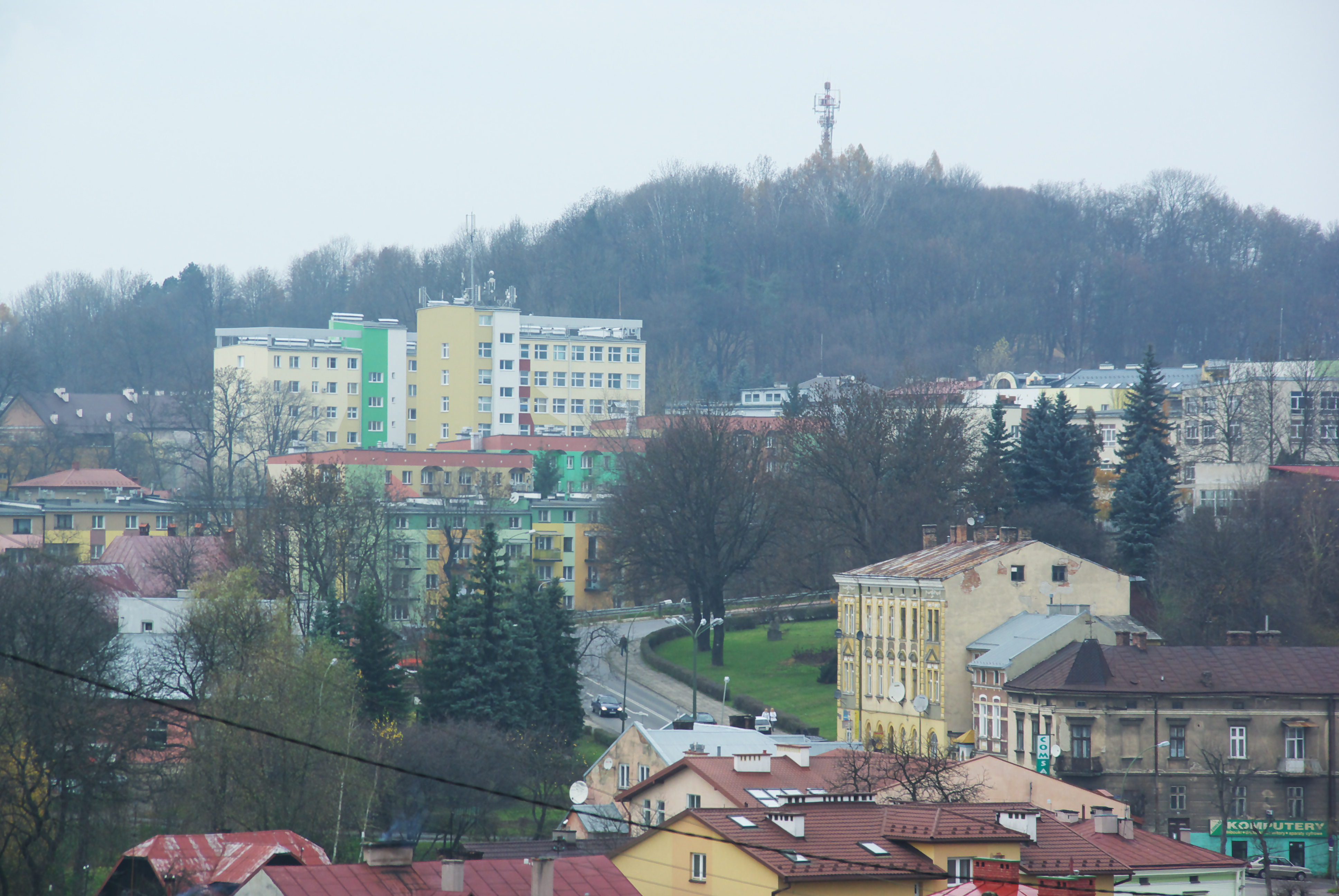 Widok na Śródmieście w Sanoku, ul Jagiellońska ze Szklanej Górki